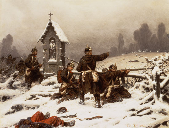 Preußische Infanterie im Winter während eines Gefechtes im Deutsch-Französischen Krieg 1870/71.